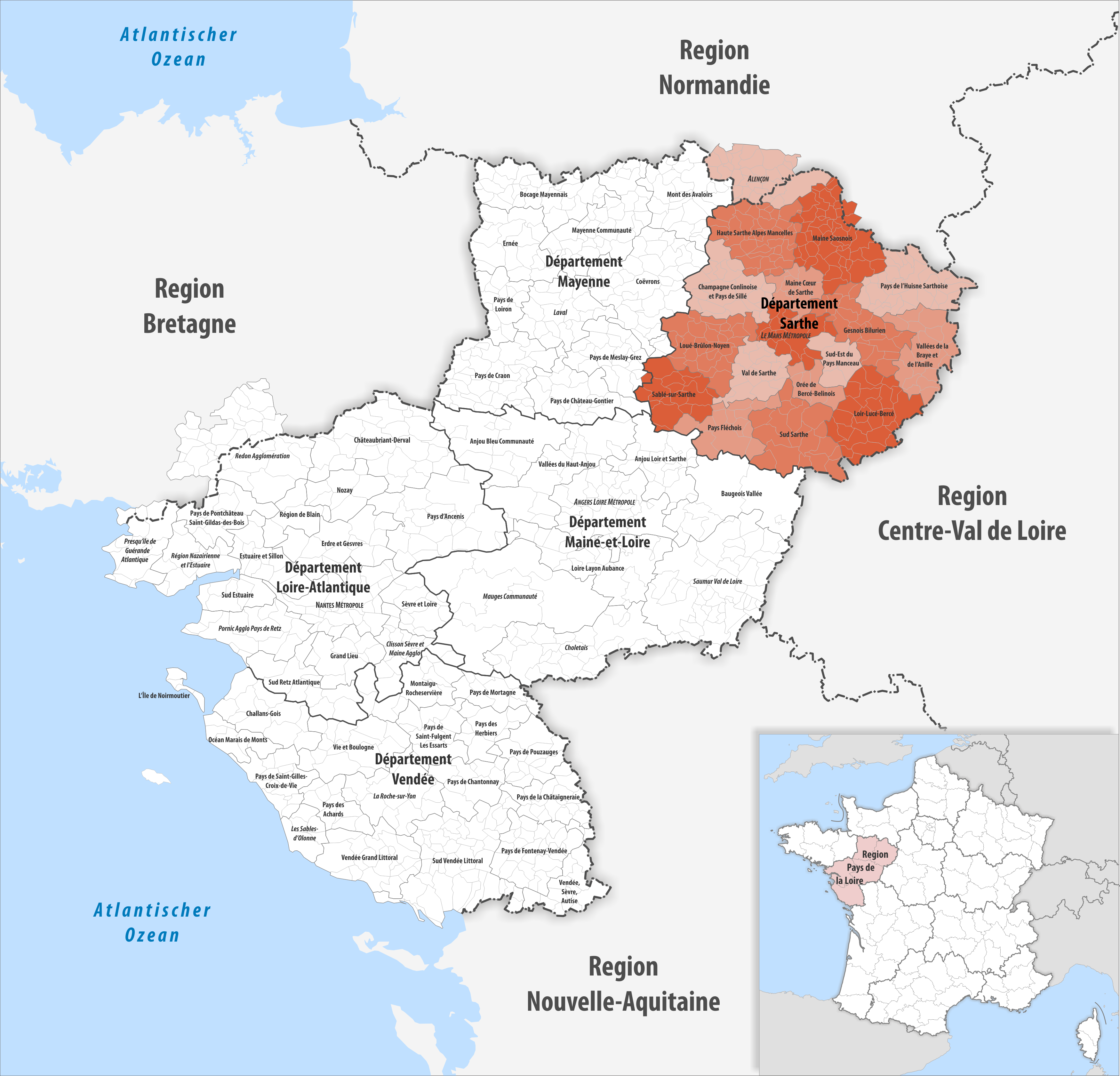 Gemeindeverbände im Département Sarthe